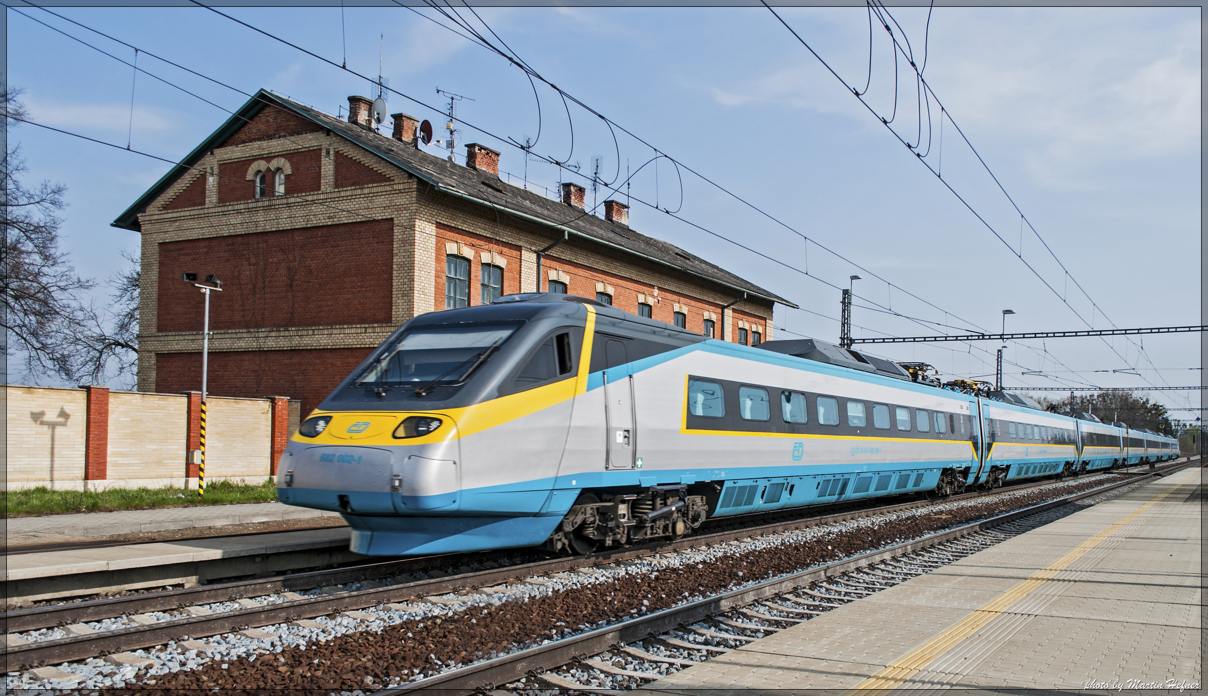 Elektrická jednotka 680.002 Českých drah, Grygov, okres Olomouc